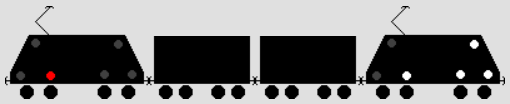 Beleuchtung gekuppelte Schiebelokomotive in der Schweiz